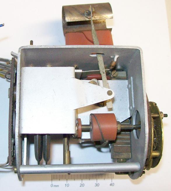 radiosonde c. 1960er Jahre, DDR